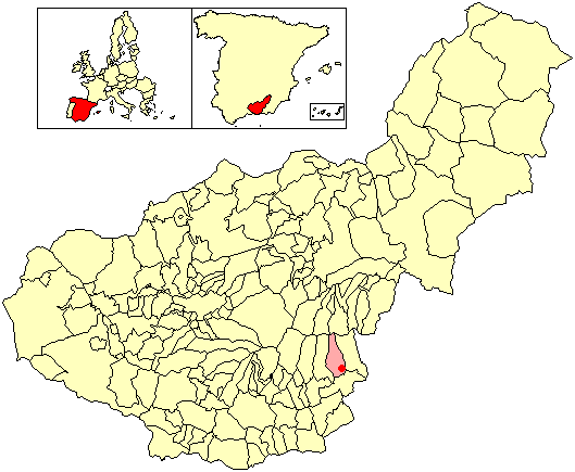 Situación de la localidad de Mecina Alfahar (en el municipio de Válor) respecto a la provincia de Granada, en España.